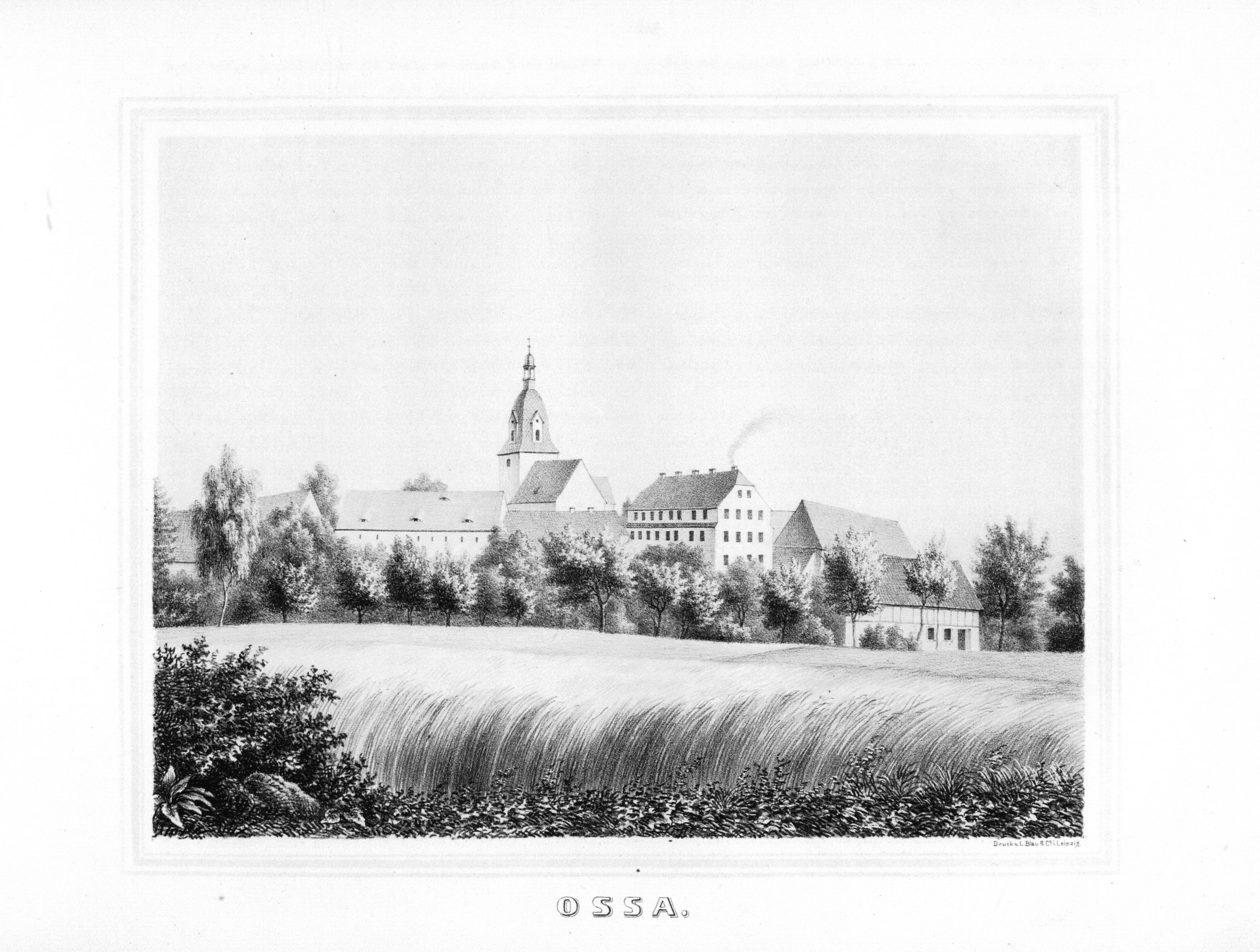 Ossa aus: Album der Rittergüter und Schlösser im Königreiche Sachsen Leipziger Kreis Section: I